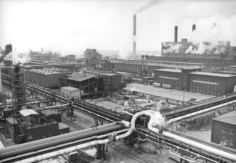 ADN-ZB-Lehmann-18.11.80-Wettbewerb-Bez.Halle: Hier im Chemiekombinat Buna wurde jetzt ein neues Polyvinylchlorid mit dem Gütezeichen "Q" versehen. Damit wurde ein wichtiges Qualitätsziel in Vorbereitung des XI. Parteitages erreicht. Das neue Erzeugnis ist das erste von fünf Pvc-S-Typen einer neuen Generation, mit deren Überführung in die Produktion das Kombinat Chemische Werke Buna in diesem Jahr begann. Es entspricht in seinen Parametern dem internationalen Höchststand und dient als Ausgangsstoff für Platten, Folien, Kabel und Profile.